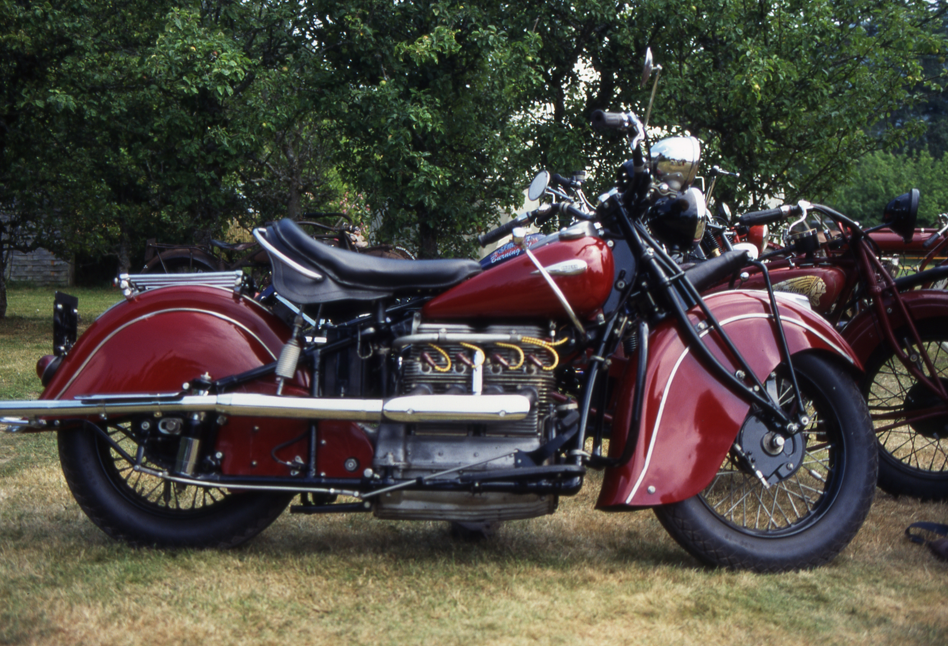 Indian Four 1940 R4, wechselgesteuert, 1265 ccm, 40 PS